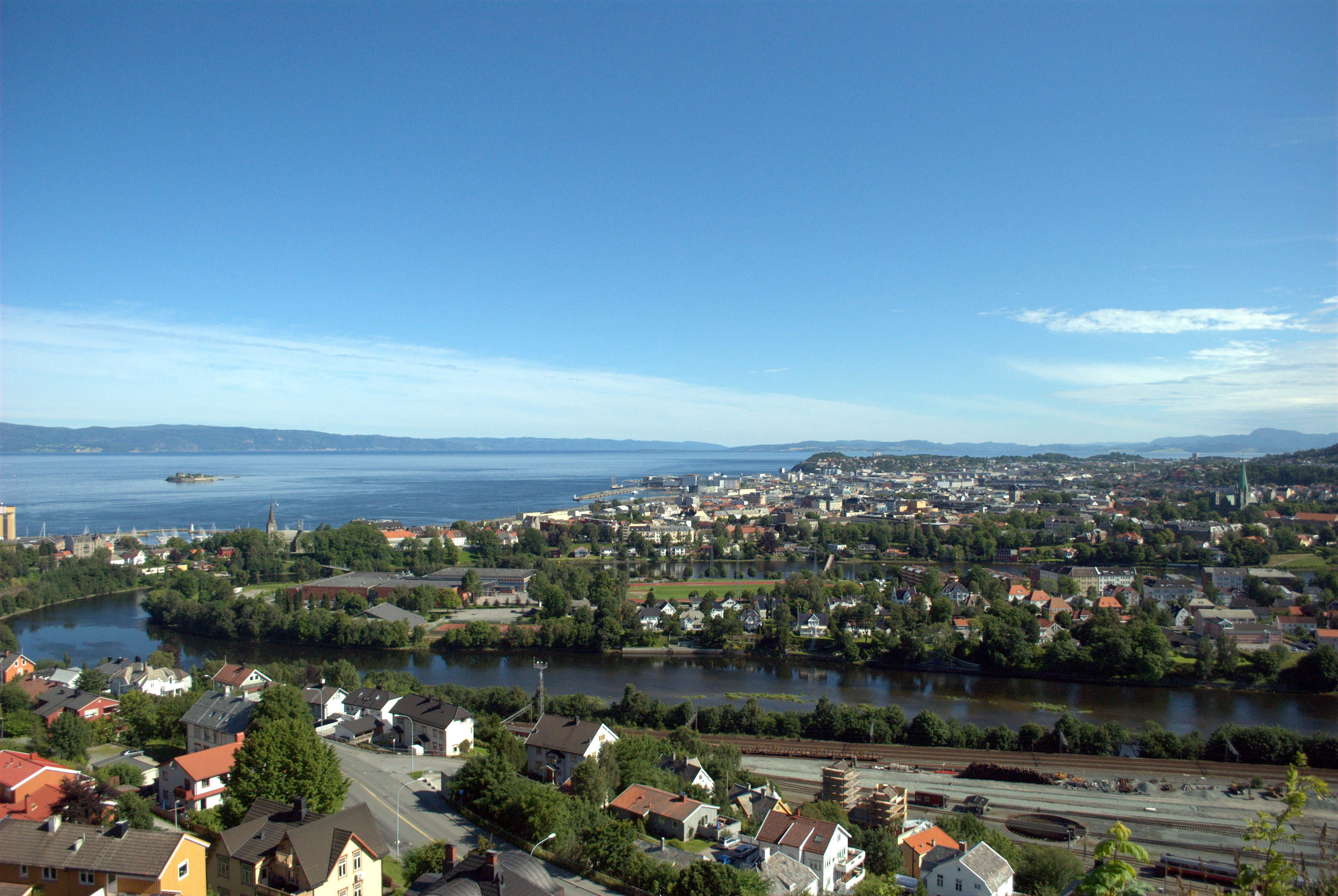 Trondheim og Øya sett fra Utsikten.